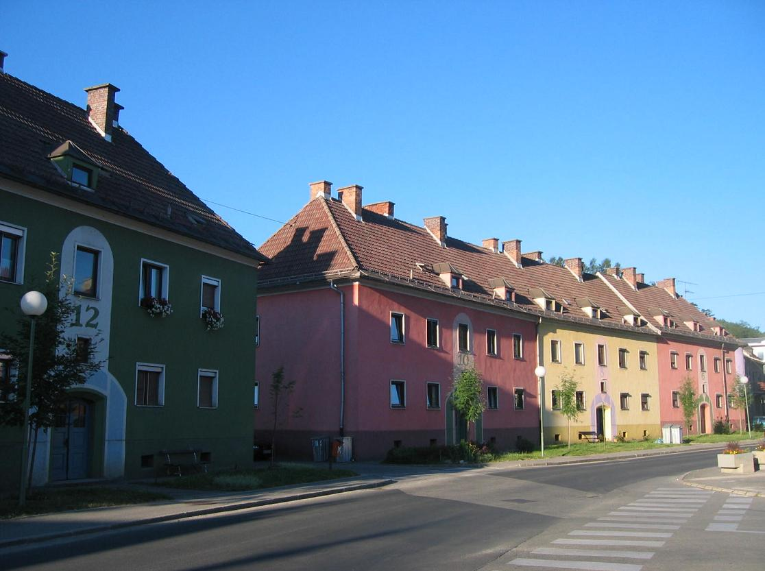 Ravne na Koroškem, town detail. photo:Ziga 21:30, 12 August 2006 (UTC)